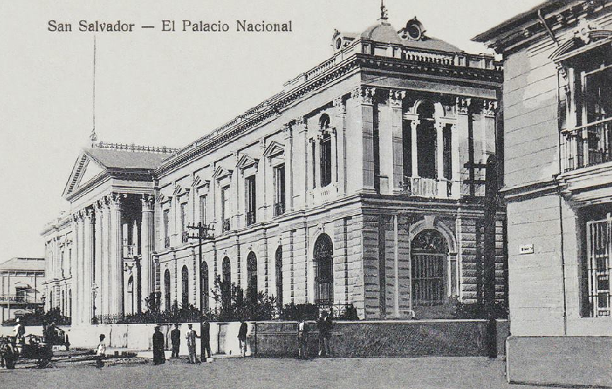 Palacio Nacional - San Salvador, 1911